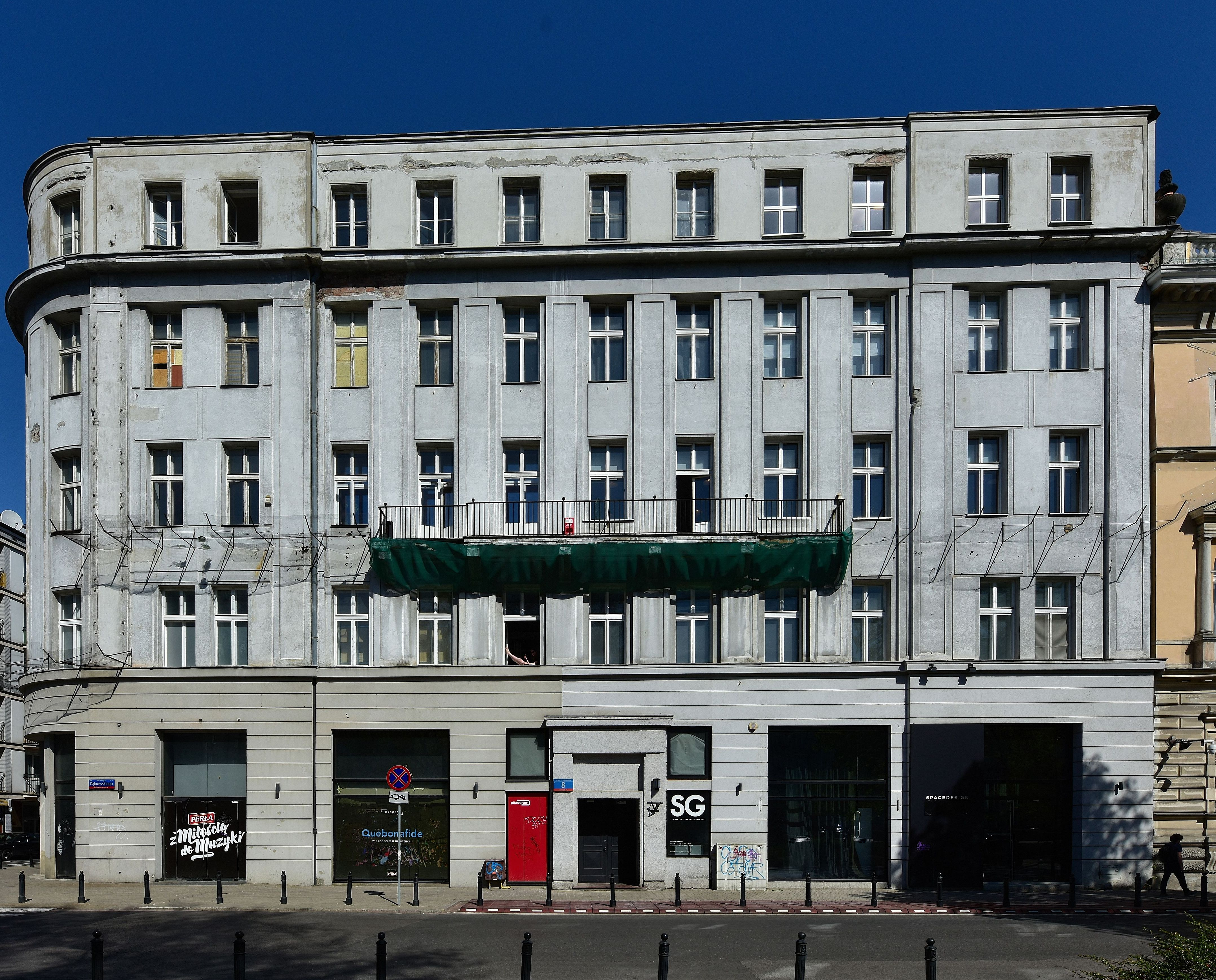 Kamienica Goldstanda przy placu Dąbrowskiego 8 w Warszawie